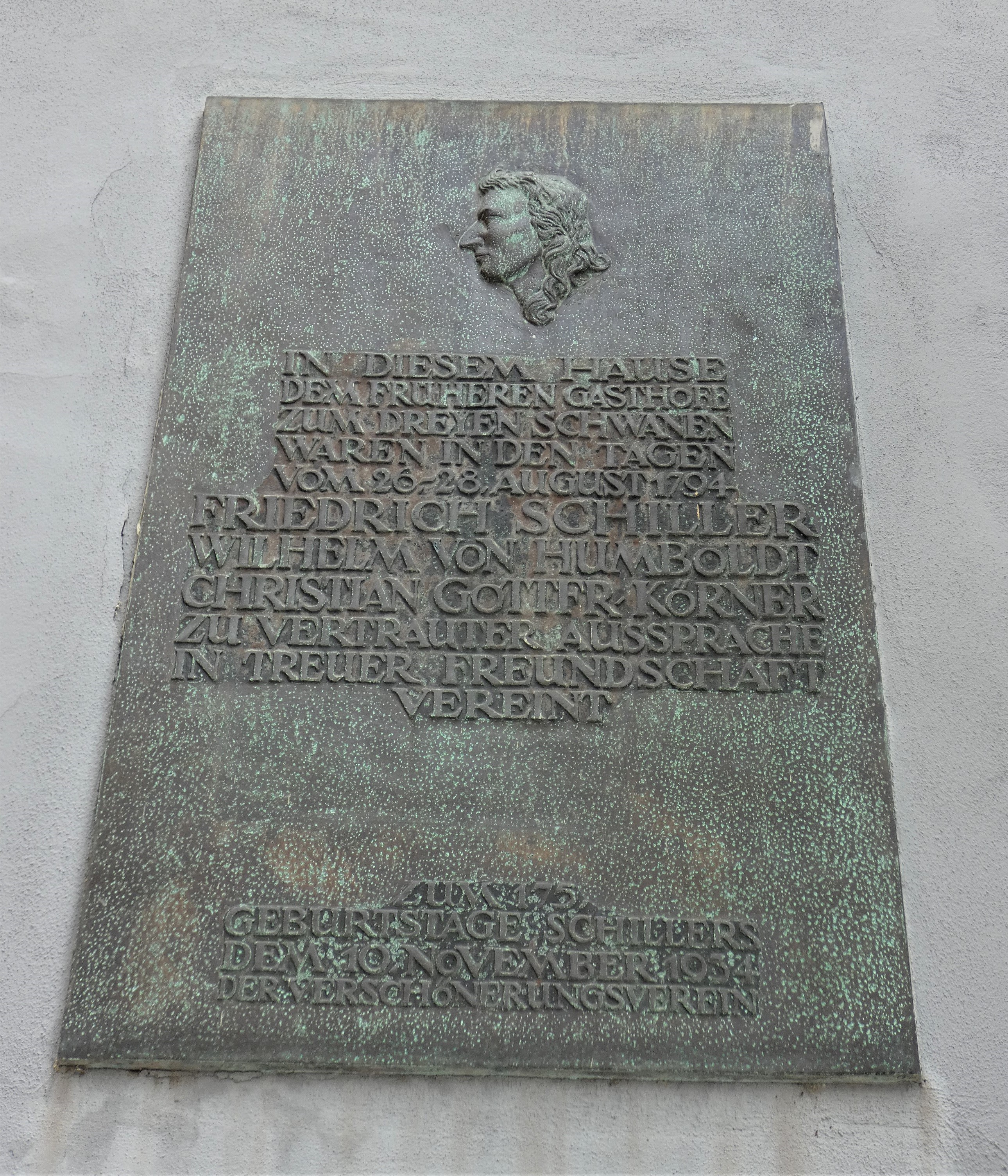 Tafel zum Gedenken an ein Treffen vom 26.-28. August 1794 zwischen Friedrich Schiller, Wilhelm von Humboldt und Christian Gottfried Körner, dem Vater Theodor Körners, im Gasthof Zu den drei Schwänen